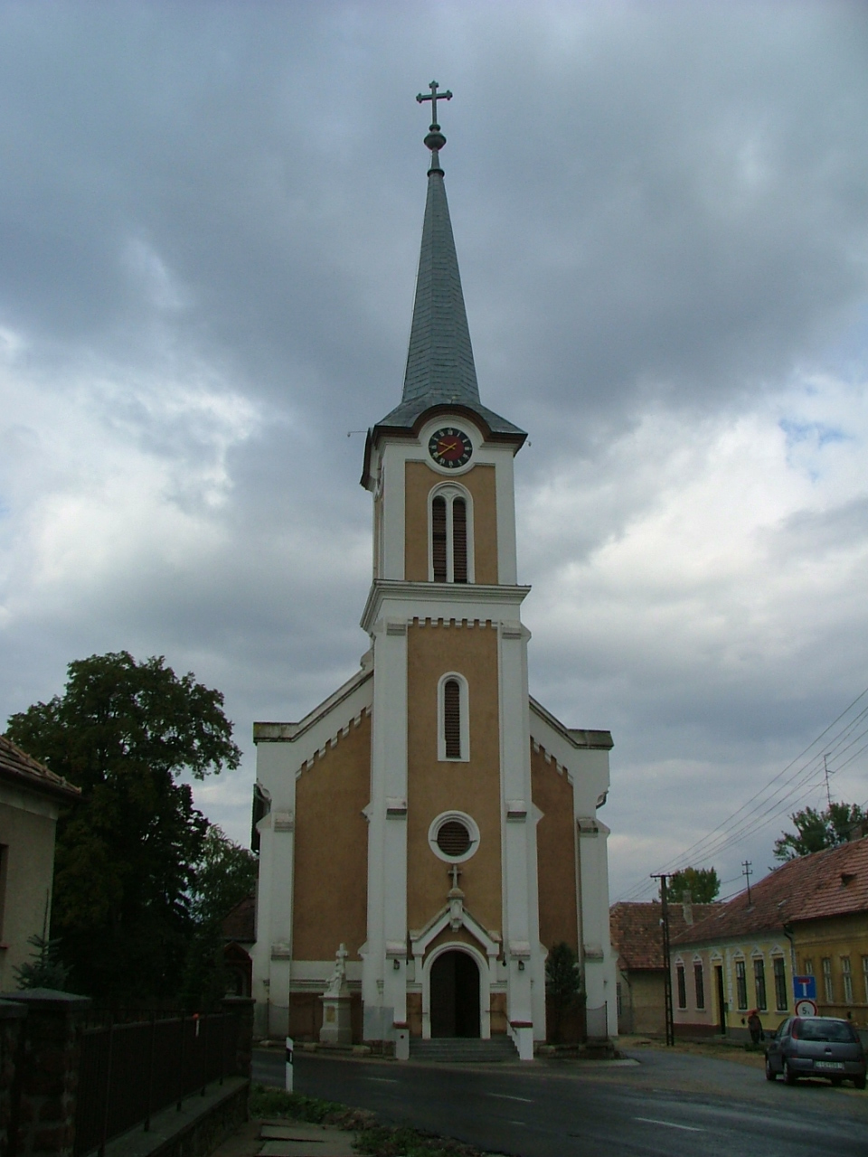 Fertőendréd, rk Szt István templom